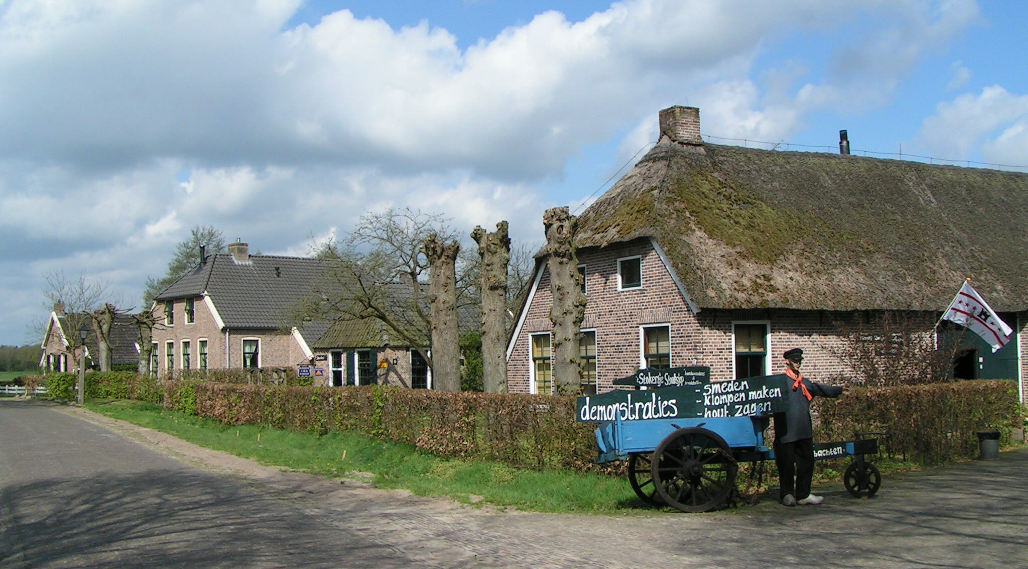 Openluchtmuseum Orvelte